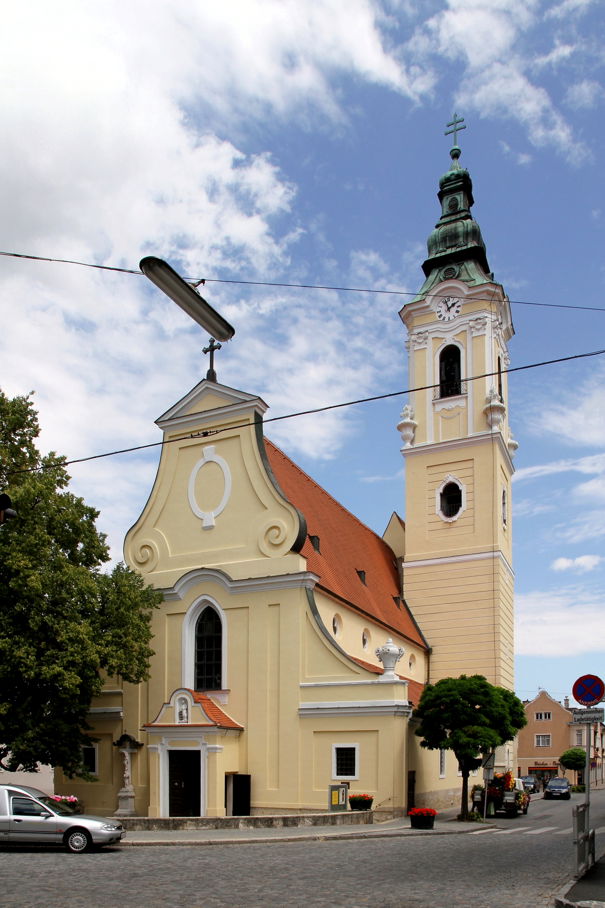 Die kath. Pfarrkirche hl. Laurentius in der niederösterreichischen Stadt Langenlois.